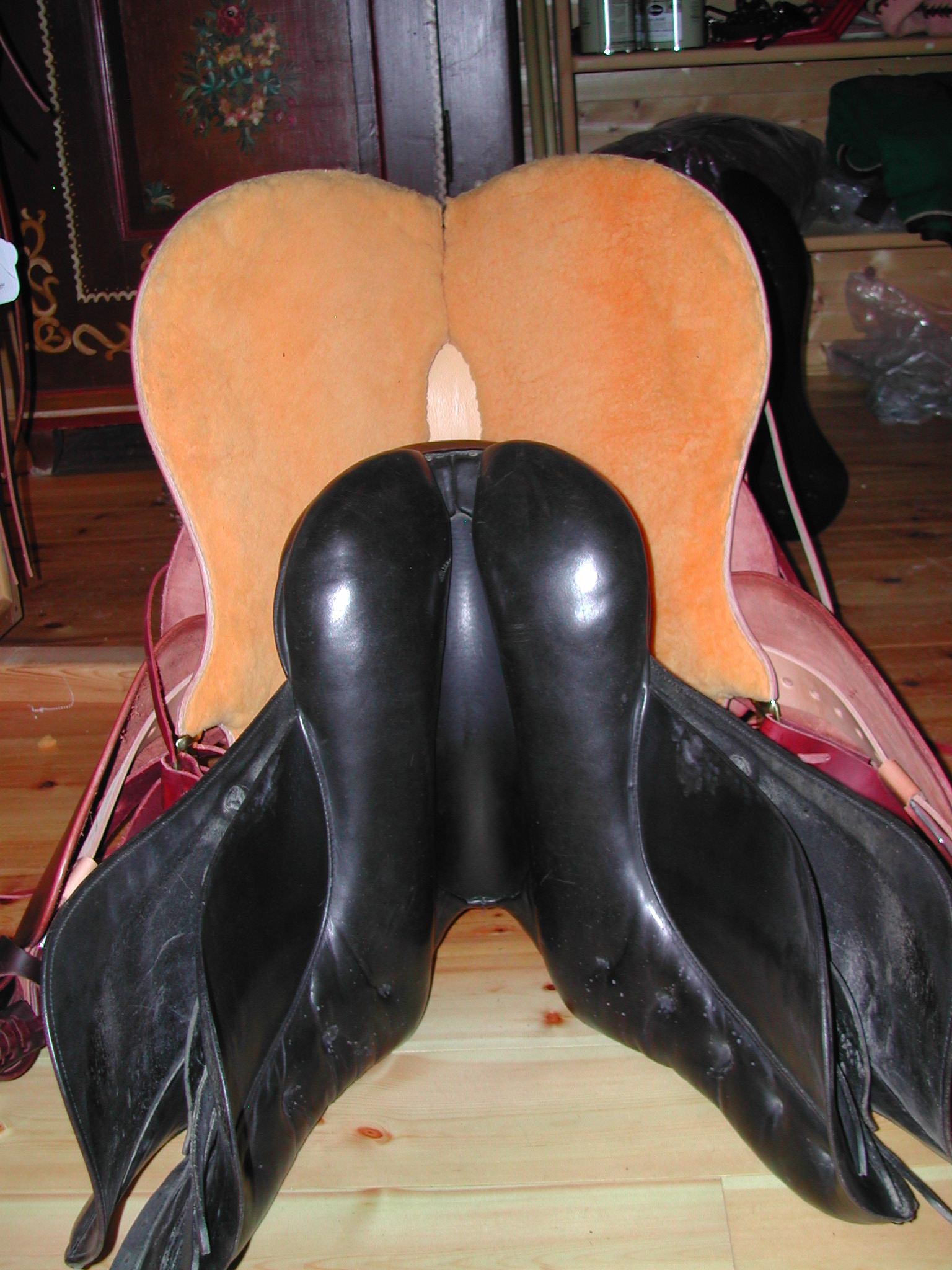 Vergleich der Auflageflächen von Dressursätteln: englisch, altkalifornisch